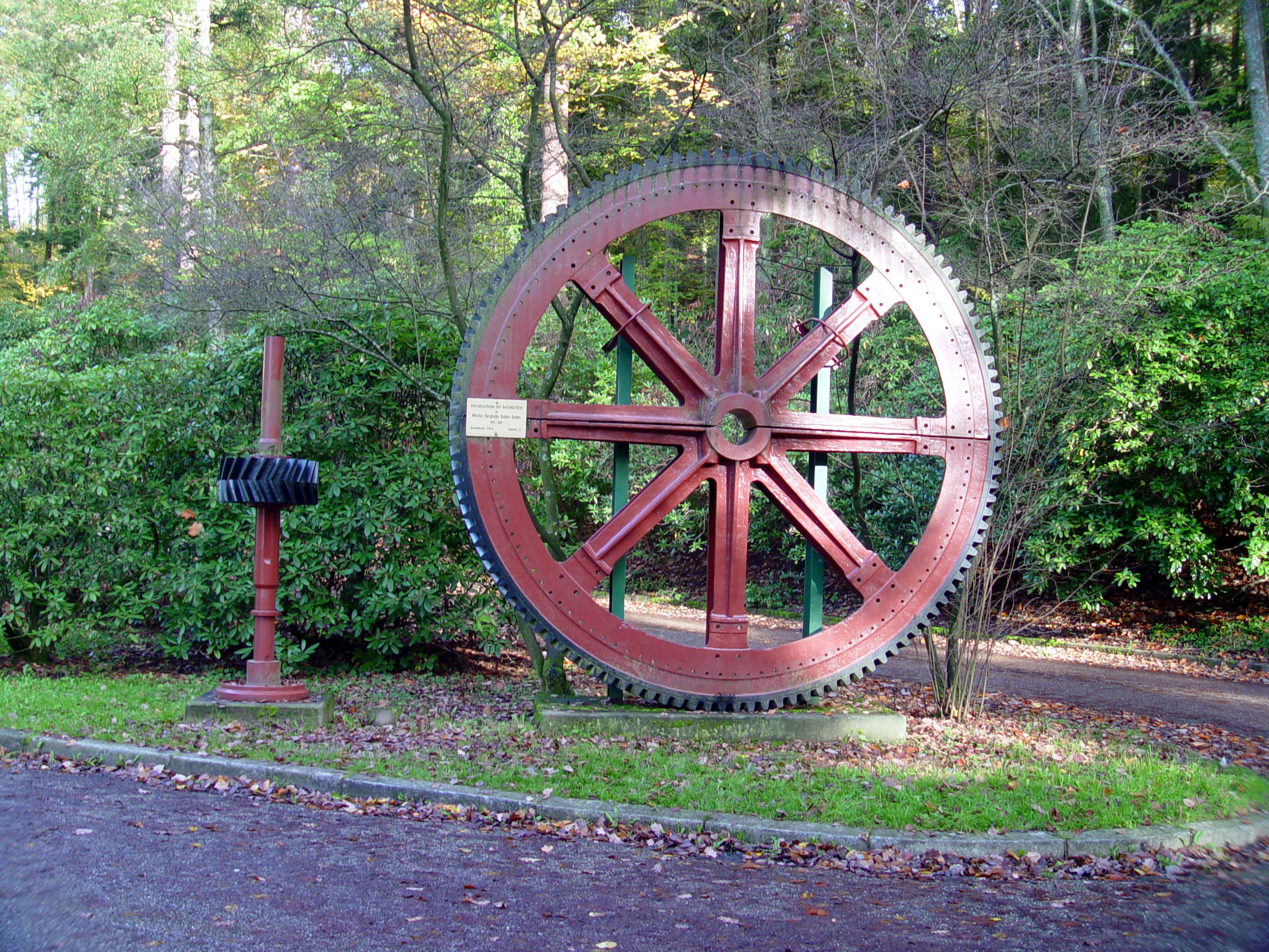 Motiv: Antriebsscheibe mit Antriebsritzel der Merkur Bergbahn in Baden-Baden von 1913 bis 1967. Fotografiert von Martin Dürrschnabel Kamera Sony DSC-F717